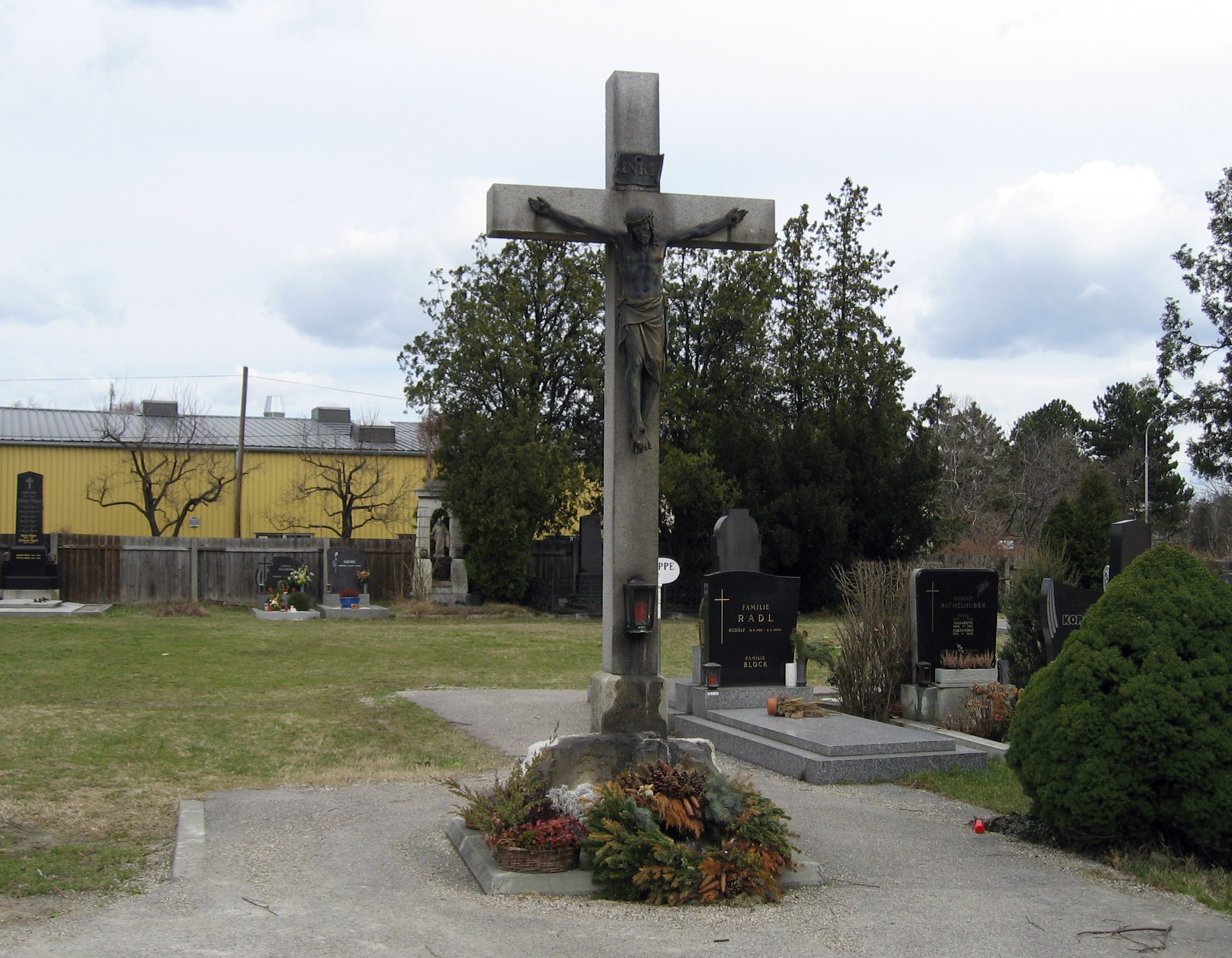 Friedhof Hirschstetten, Kreuz